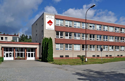 Vchod na pracoviště strojírenská